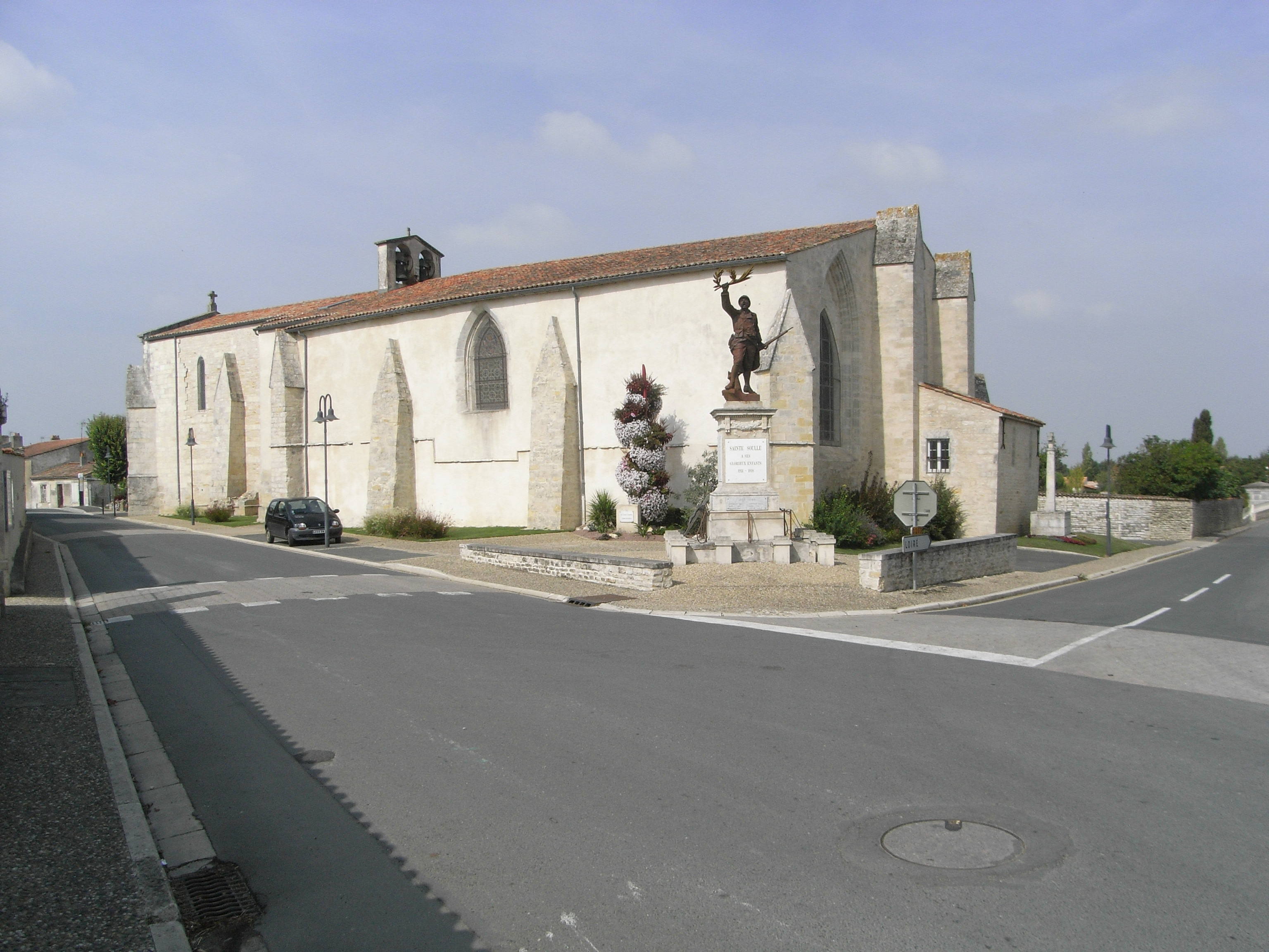 Église et monuments aux morts de Sainte-Soulle en Charente-Maritime (France).